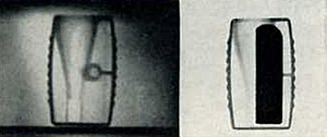 Neutrographie und Röntgenaufnahme eines Bleistiftanspitzers aus Plastik, Aufnahme aus dem Forschungszentrum Jülich 1976